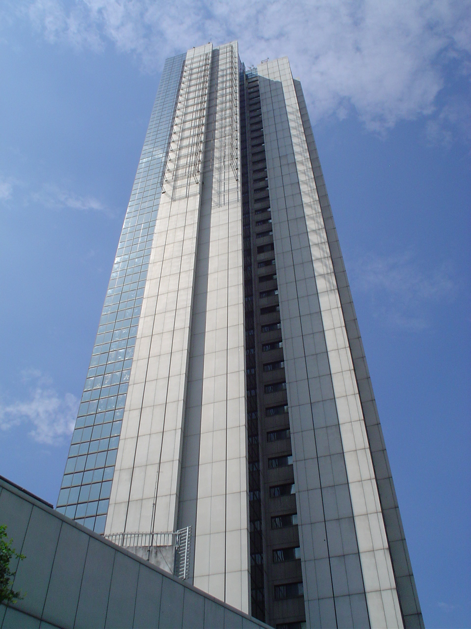 Torre de Cali, ubicado en la ciudad de Santiago de Cali, colombia